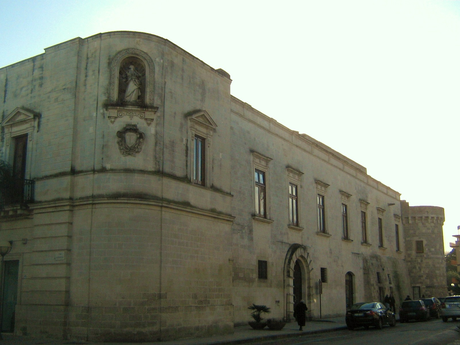 Palazzo Baronale di Martano, provincia di Lecce